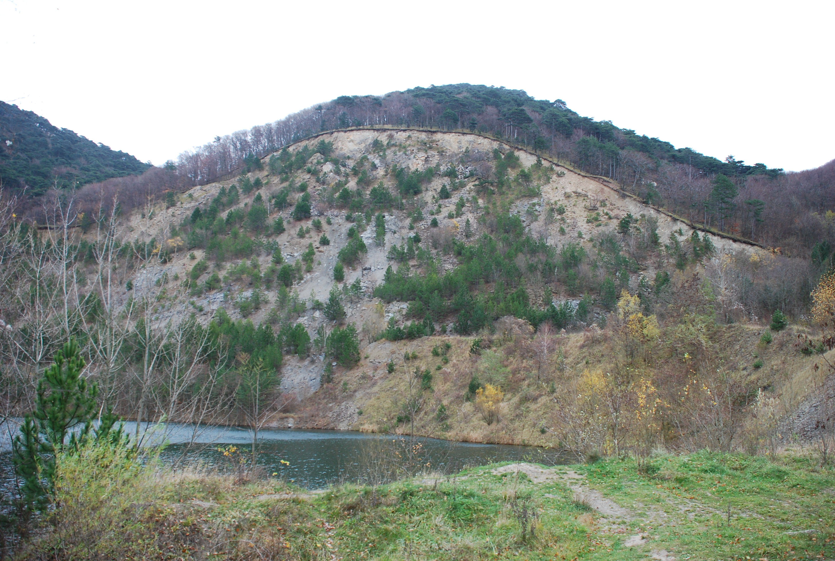 Steinbruchhang im Norden des Teufelsteins